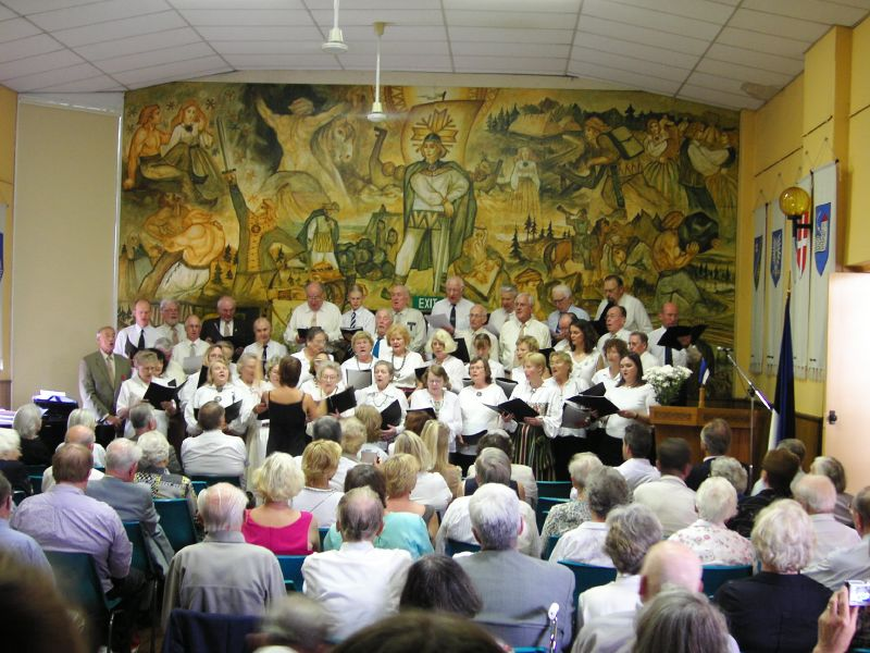 Vabariigi aastapäeva tähistamine Sydneys Eesti Majas. Koorid laulsid, saime laulda meiegi. 24/02/2007